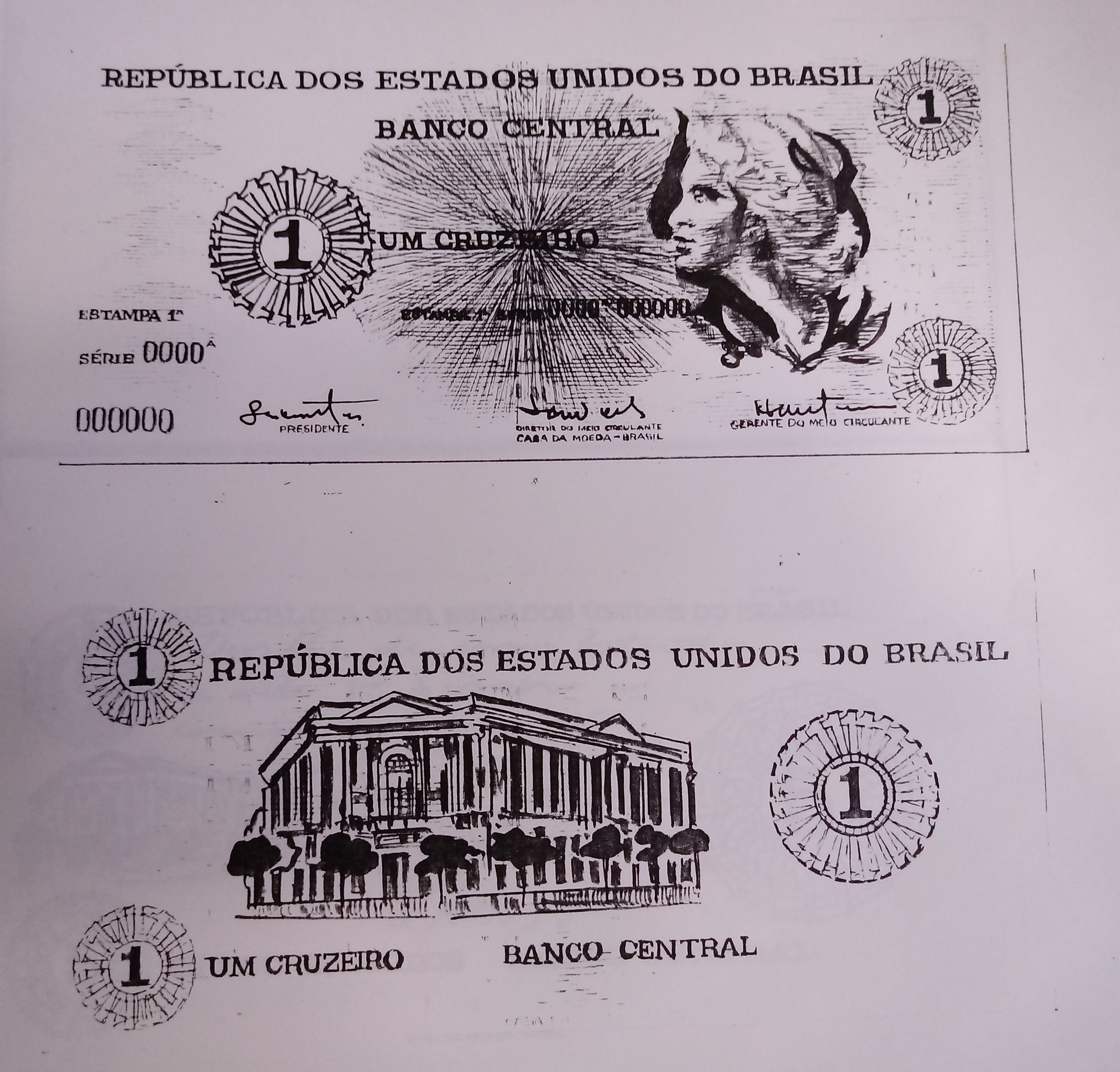 Scan de projeto de cédula de 1 Cruzeiro, de Alexandre Wollner, das cédulas que participaram do concurso de 1966 para a escolha do padrão para as cédulas da unidade monetária brasileira da época, o Cruzeiro (1970–1986).